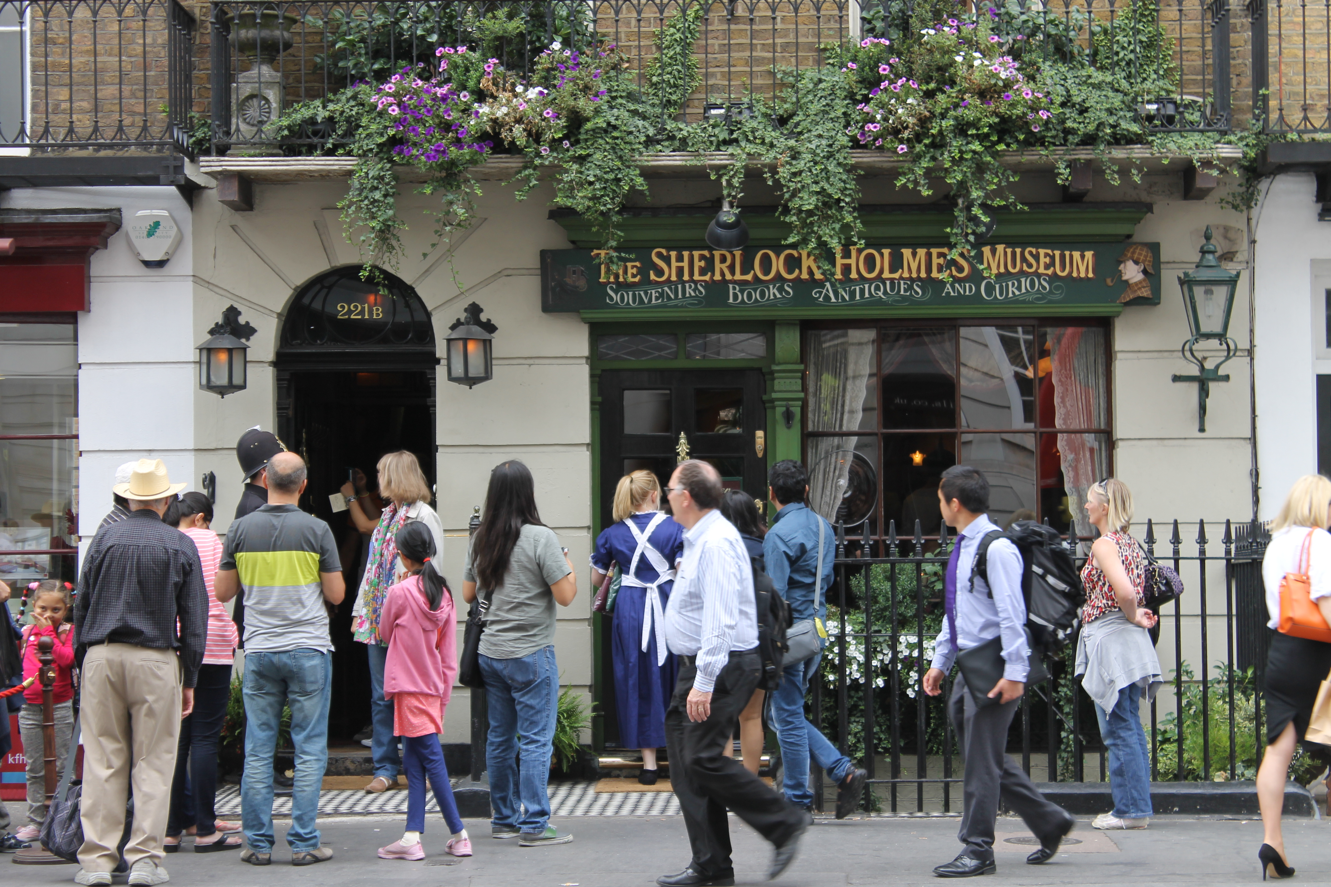 Sherlock Holmes Museum